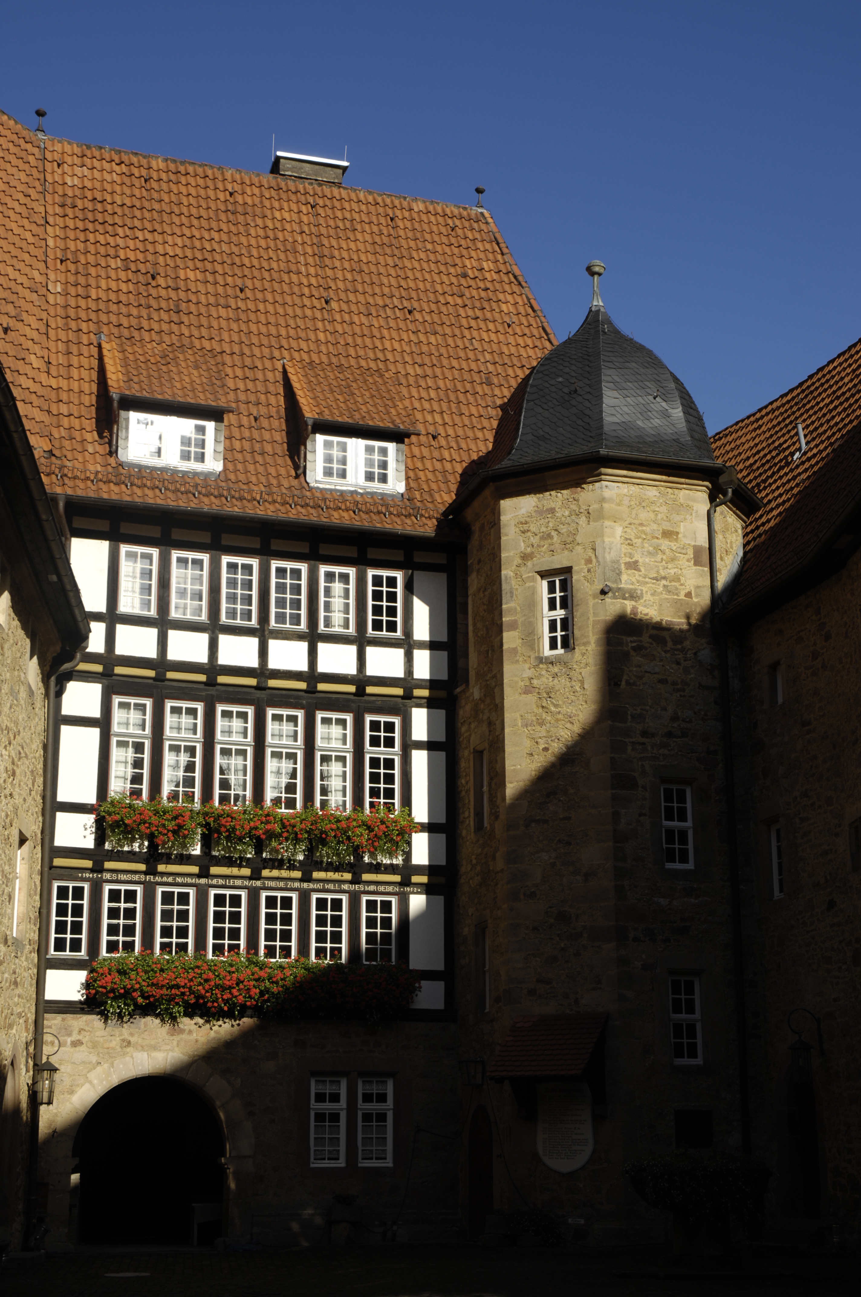 Burg Spangenberg, Hessen, Innenraum, Fachwerk